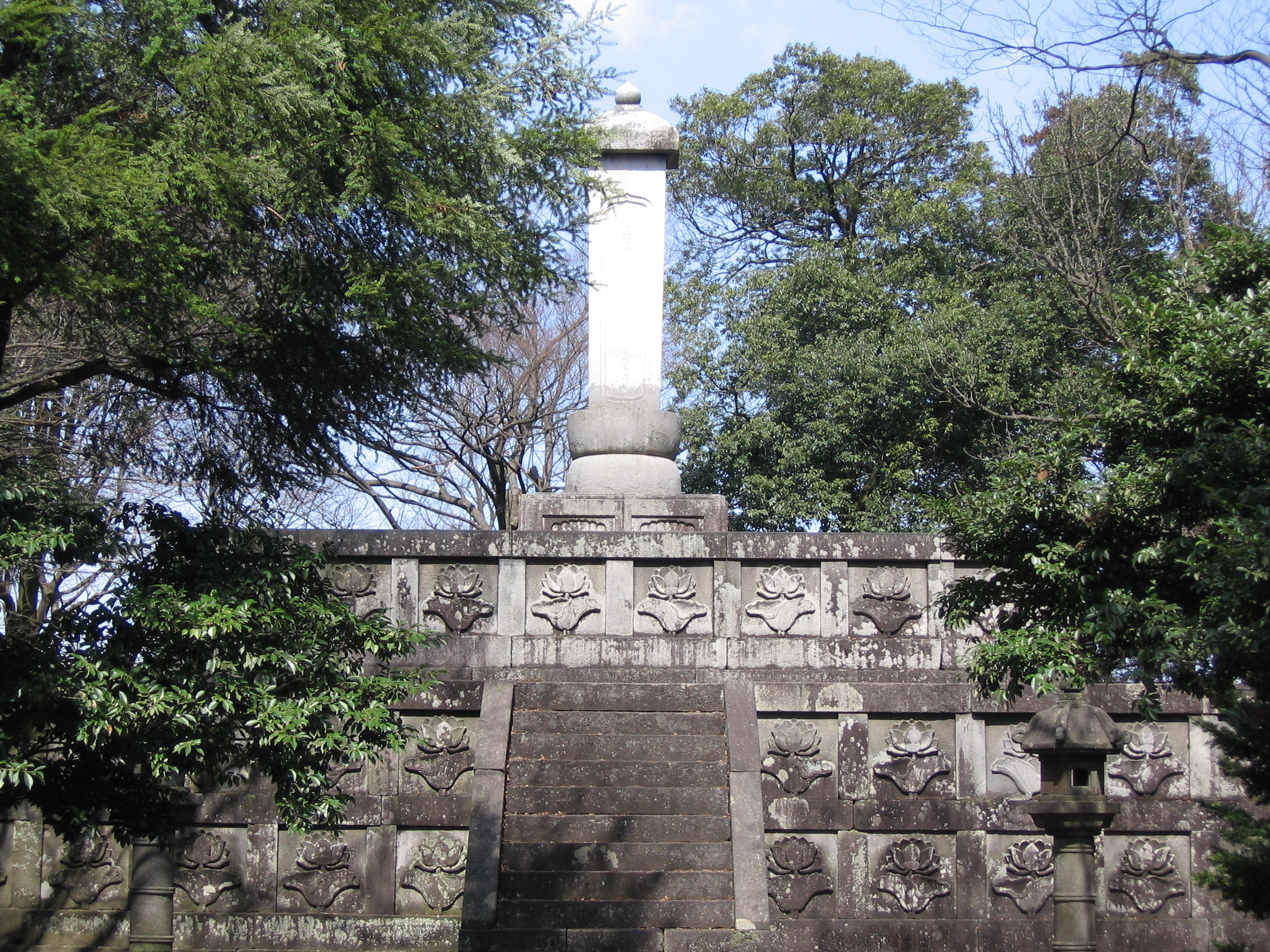 前田利長公墓所にある前田利長の墓碑（富山県高岡市）Maeda Graves, Takaoka, Toyama, Japan